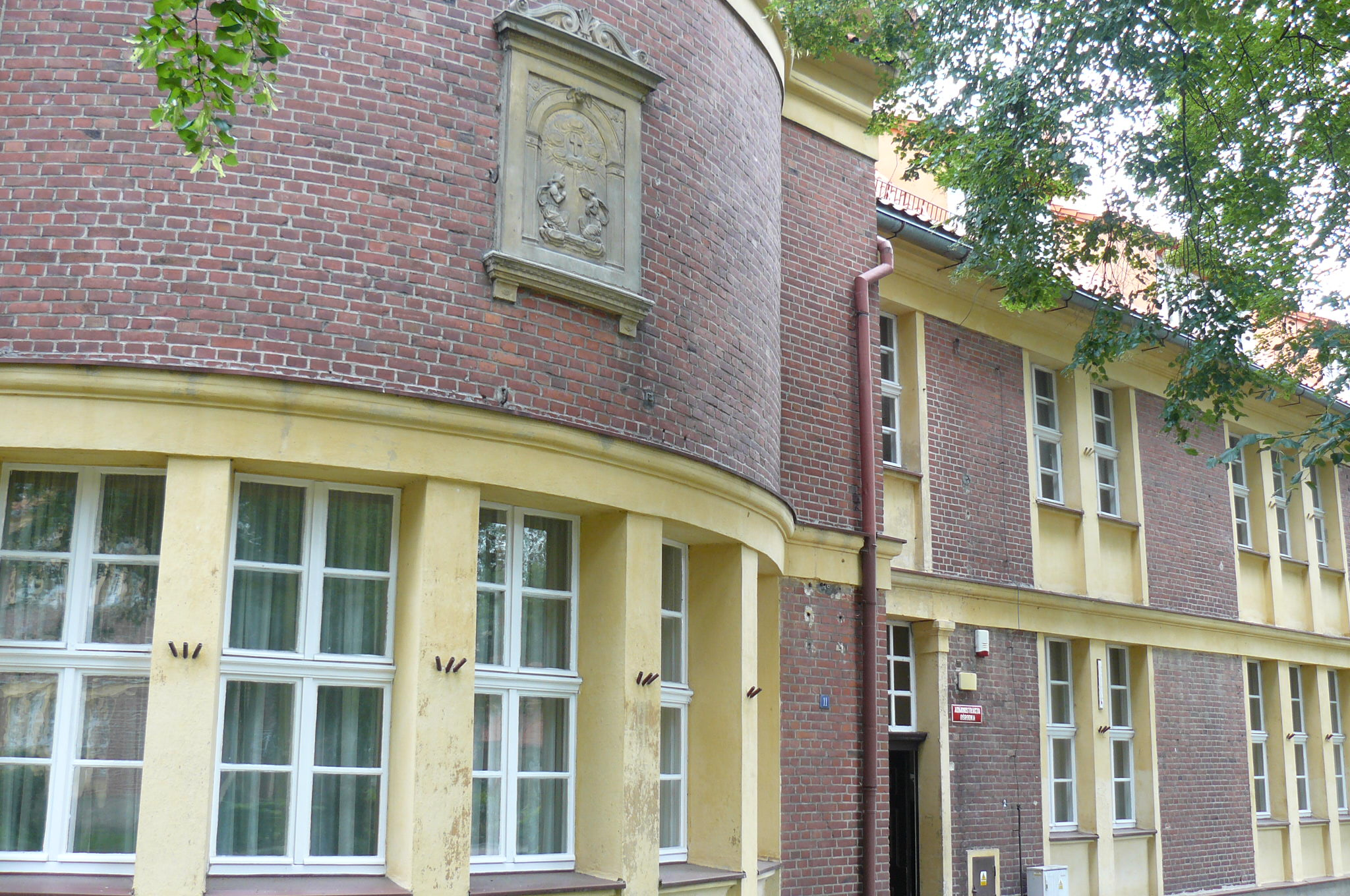 Młodzieżowy Ośrodek Wychowawczy im. Janusza Korczaka w Antoniewie (1914r., brama z 1938r.).